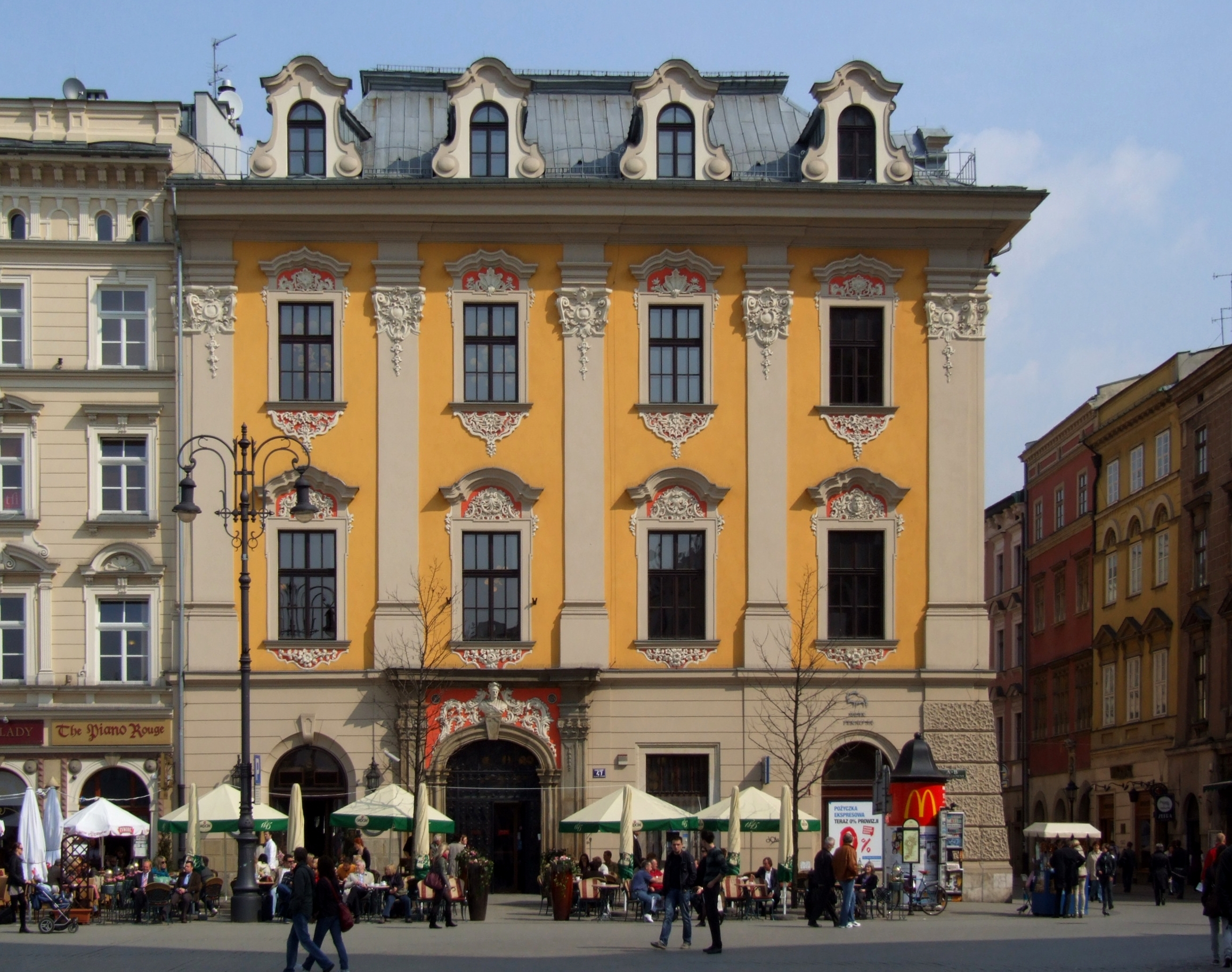 Kamienica Margrabska (Mennica) w Krakowie